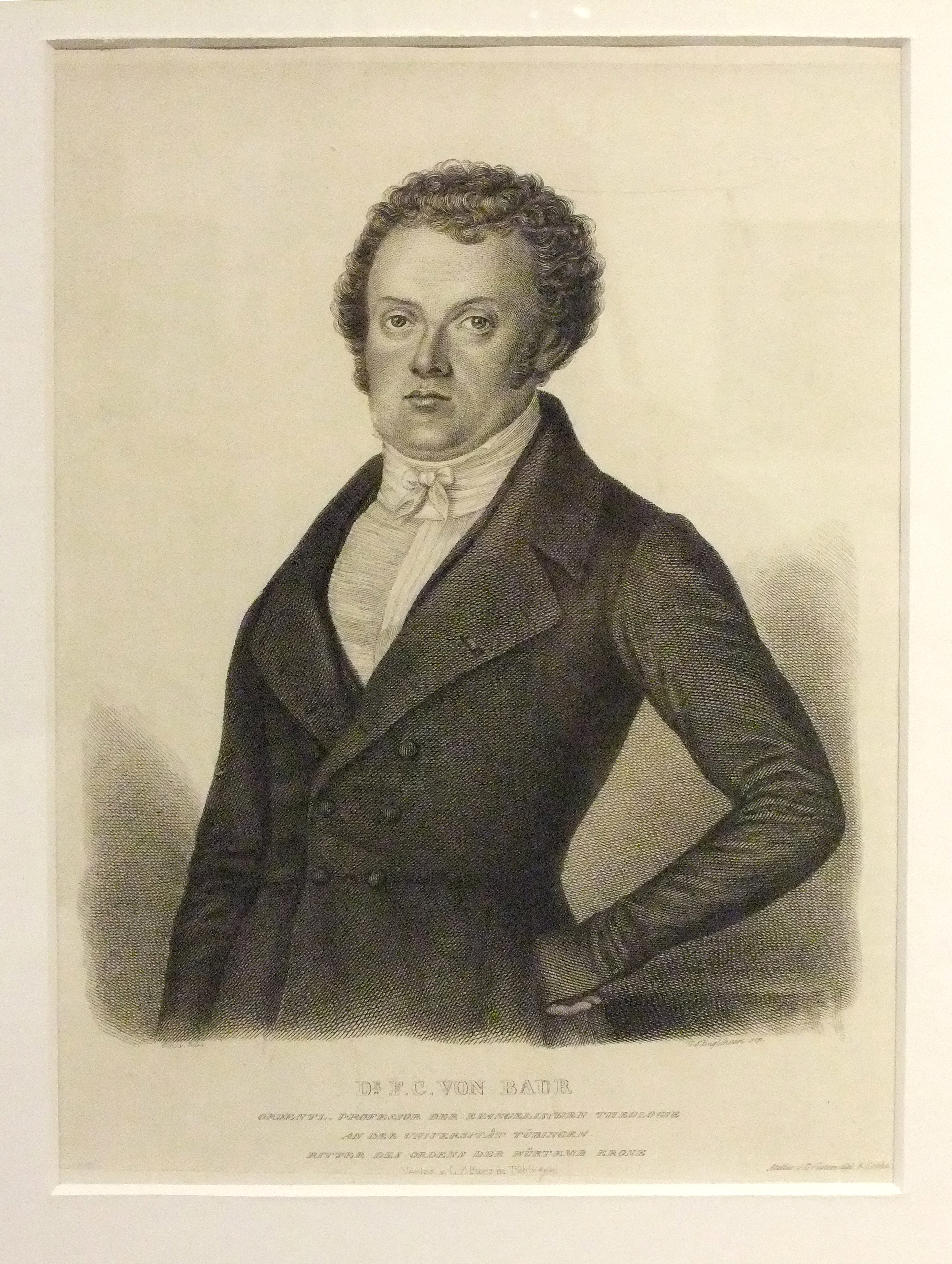 Dr. F. C. Baur (=Ferdinand Christian Baur) (Stahlstich, Stadtarchiv Stuttgart)